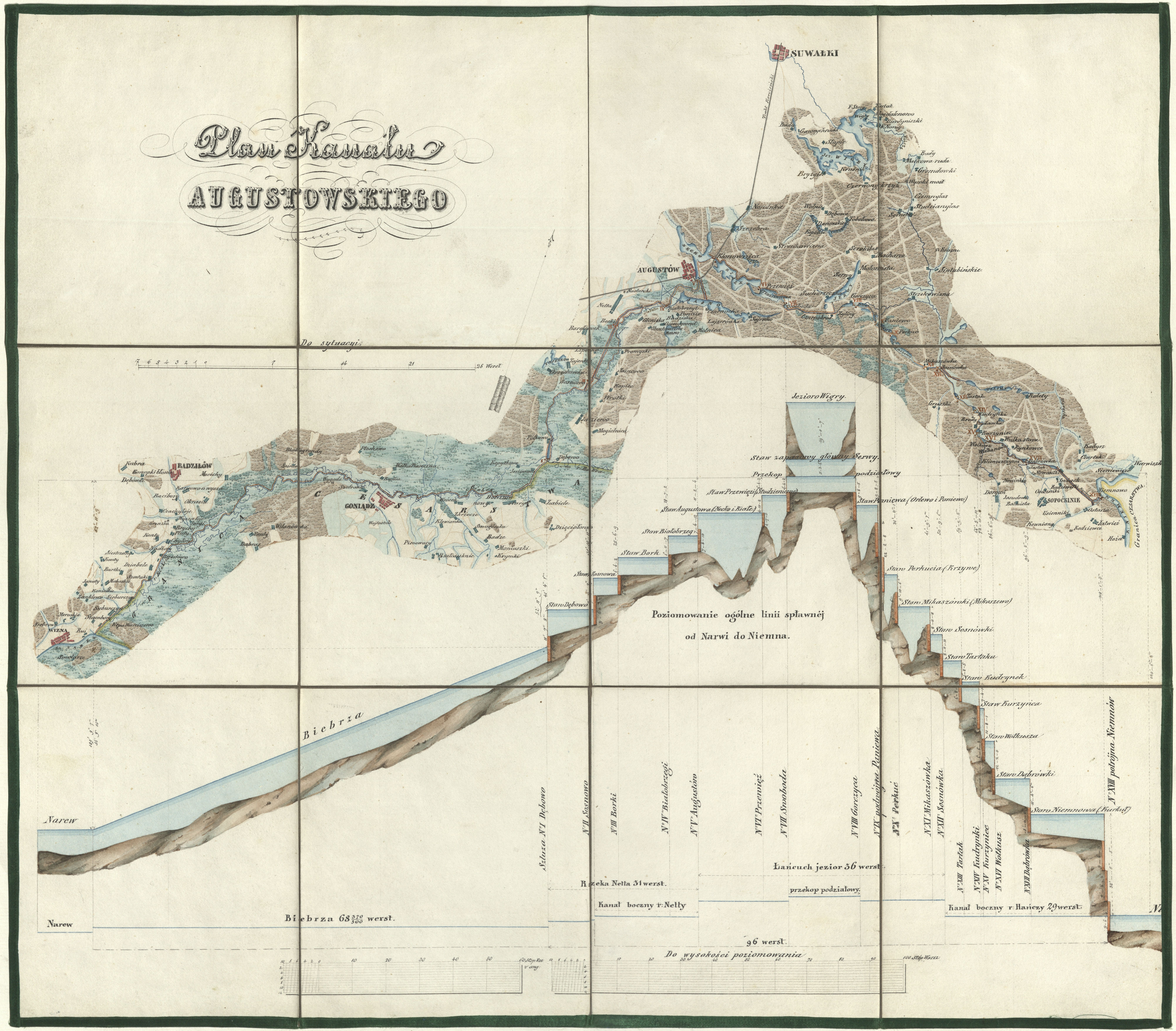 Plan Kanału Augustowskiego. Mapa, rękopis kolorowy; 45×51 cm, w etui 16×13 cm. Gabinet Zbiorów Kartograficznych BUW. Plan ten nie ma informacji o autorze i nie jest datowany. Plan ten powstał już po ukończeniu budowy, a więc w latach 40. XIX w. Plan o wymiarach 50,3 cm w podstawie i 44,2 cm w pionie składa się z 12 fragmentów podklejonych na płótnie z zabezpieczonymi zieloną tasiemką krawędziami. Całość, złożona do formatu 15 x 13 cm, mieści się w etui z epoki z ozdobnymi tłoczeniami oraz złoconym tytułem „Kanał Augustowski” w dekoracyjnej ramce.